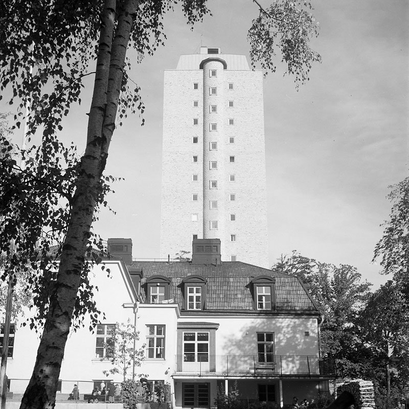 Kvinnohuset vid Welanders Väg 12, Stadshagen. Kvinnohuset i 15 våningar byggdes 1946 Referenser Upphov: Petersens, Lennart af (1913-2004). Tid: 1946 - 1950 Beteckning: Fotonummer FA 36630